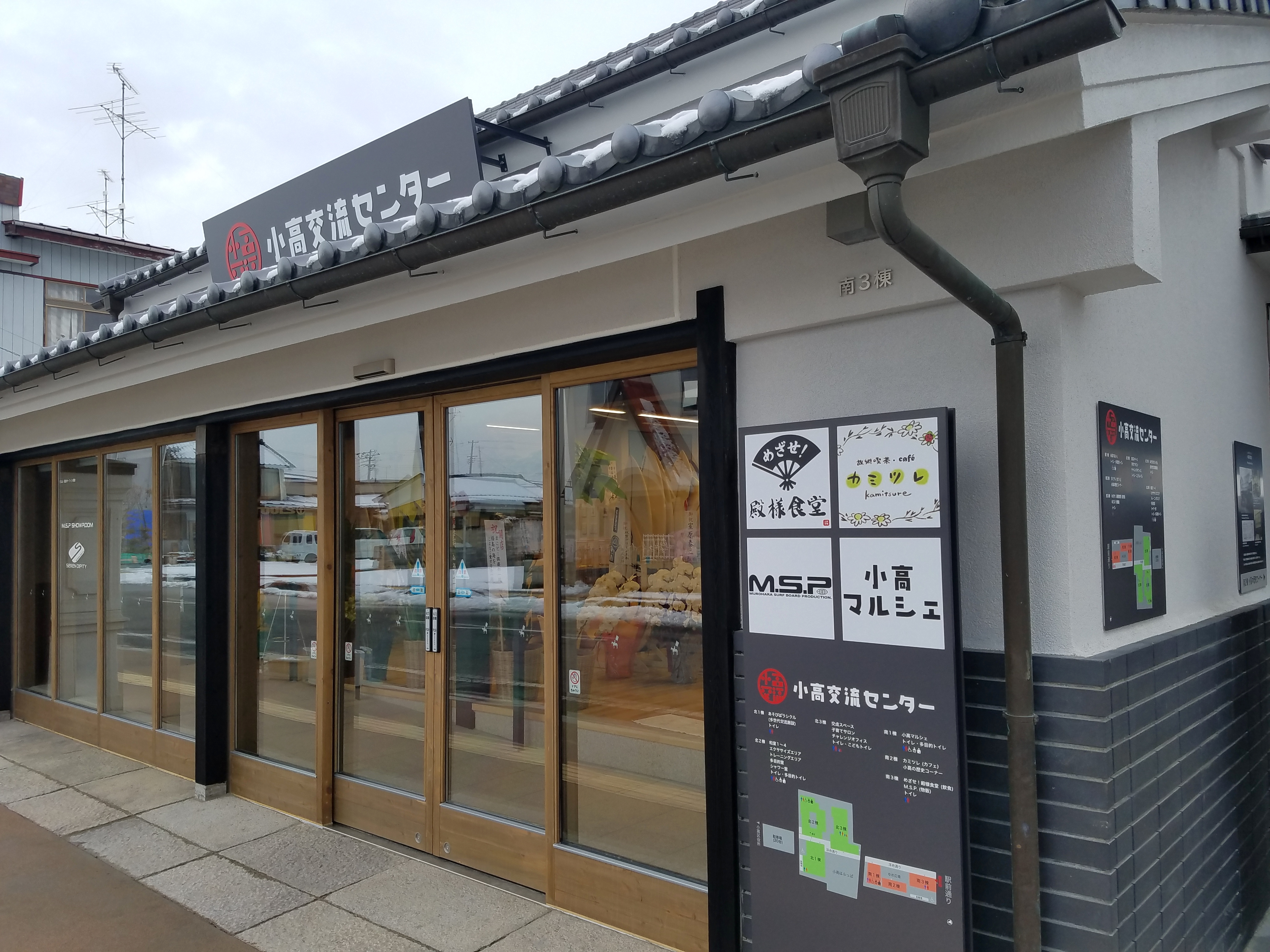 小高交流センター（福島県南相馬市）